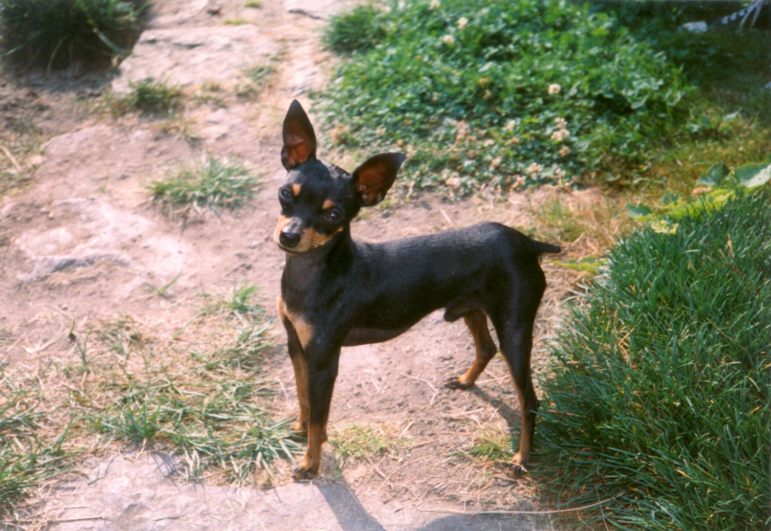 Ex Perla Moravy - pražský krysařík